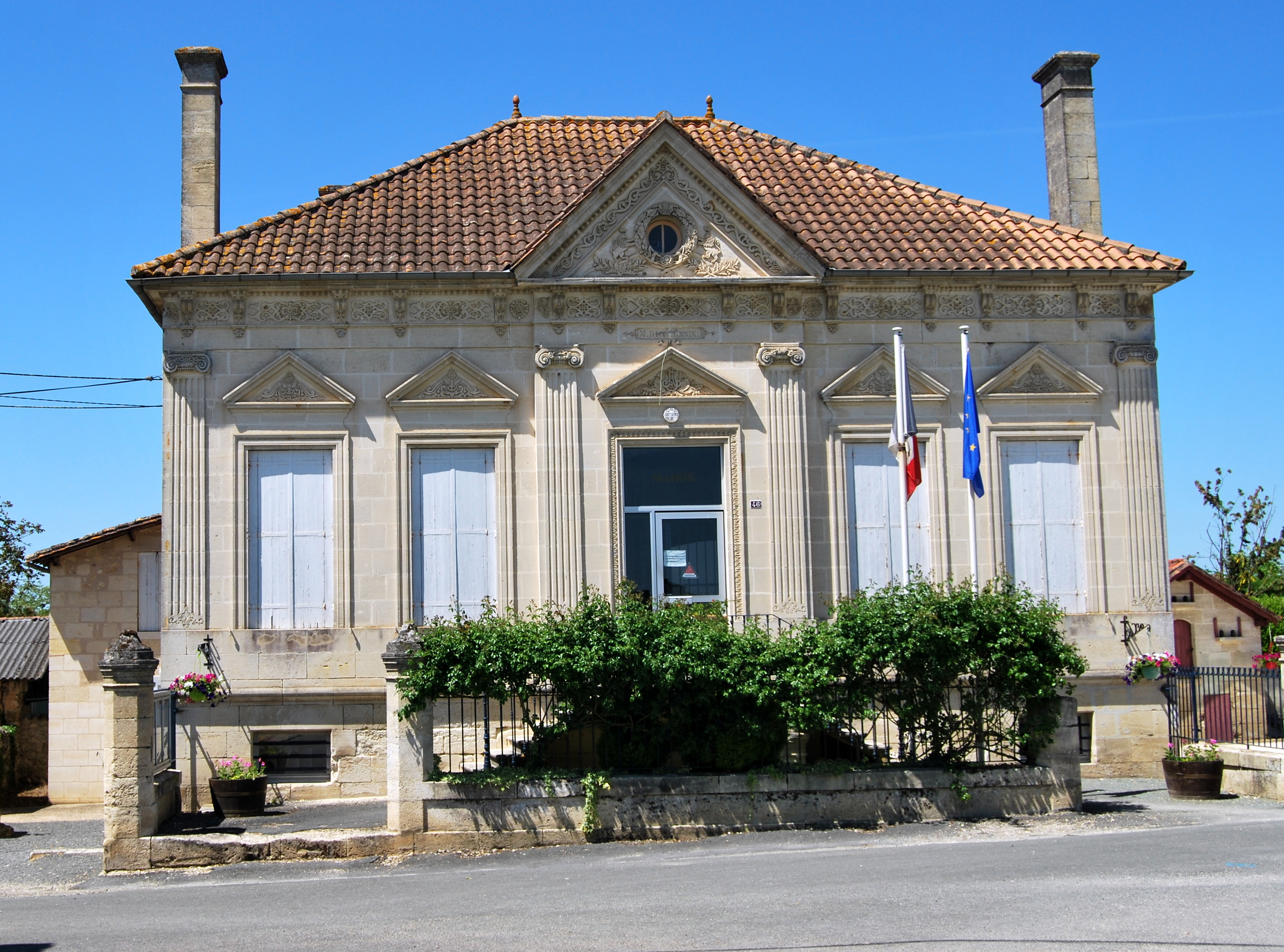 Saint-Quentin-de-Baron Mairie